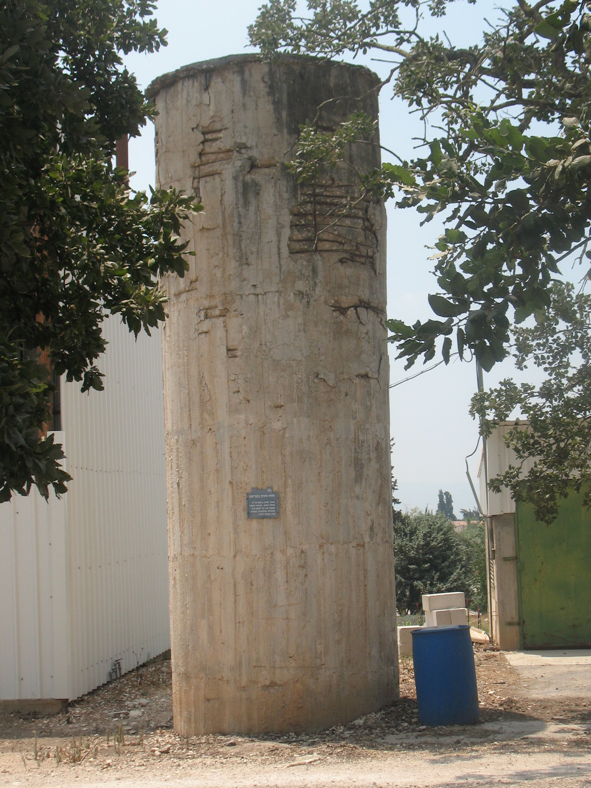 . מגדל המים ב"חוות שטוק"שליד ברמת ישי הוקם בשנים הראשונות להקמת החווה ושימש לאספקת מיים לחיי ולצומח צילום :אלי אלון (אין להפיץ או לפרסם תמונה זו ללא מתן קרדיט ליוצר התמונה אלי אלון